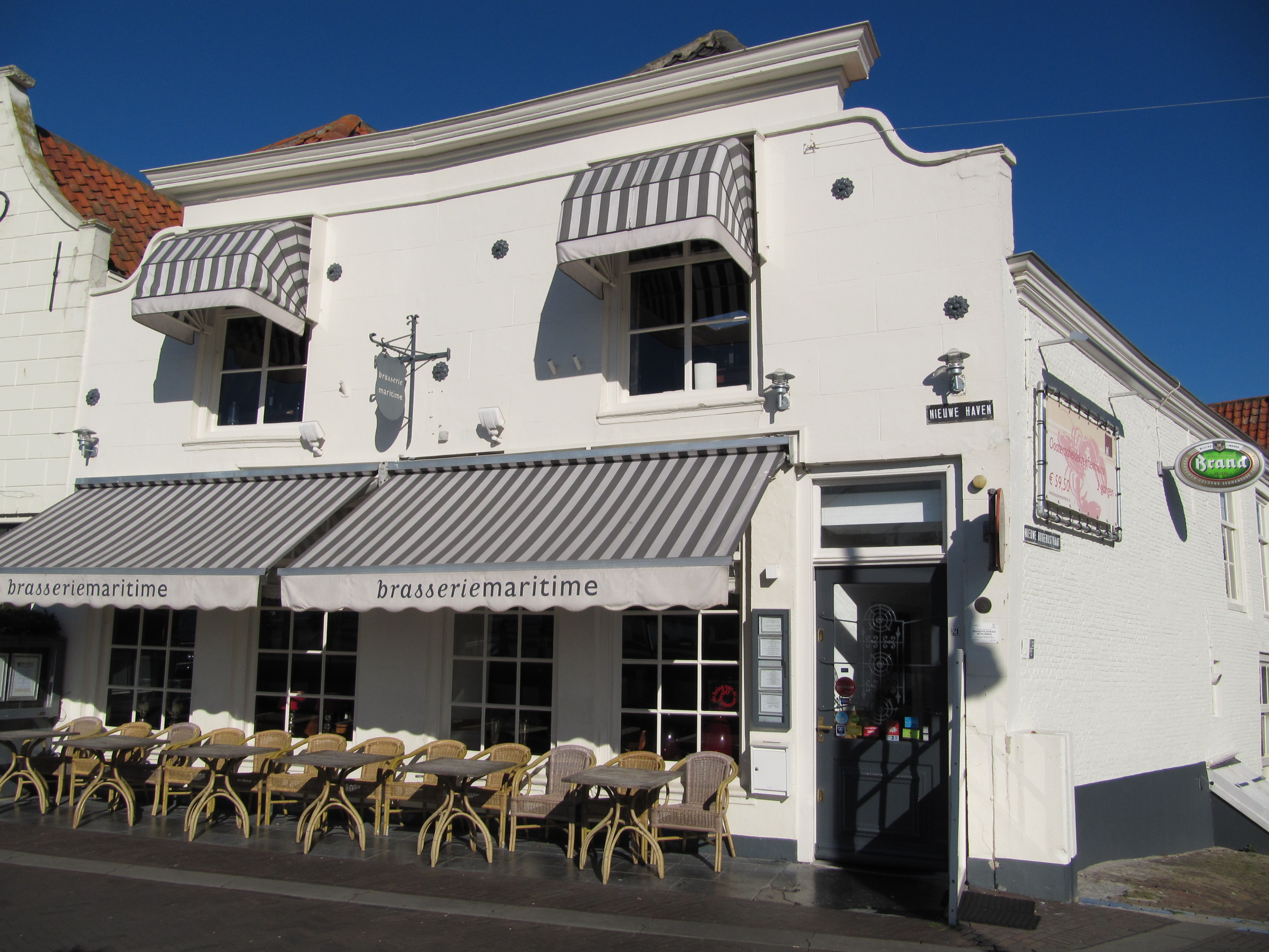 RM40824 Zierikzee - Nieuwe Haven 21.jpg